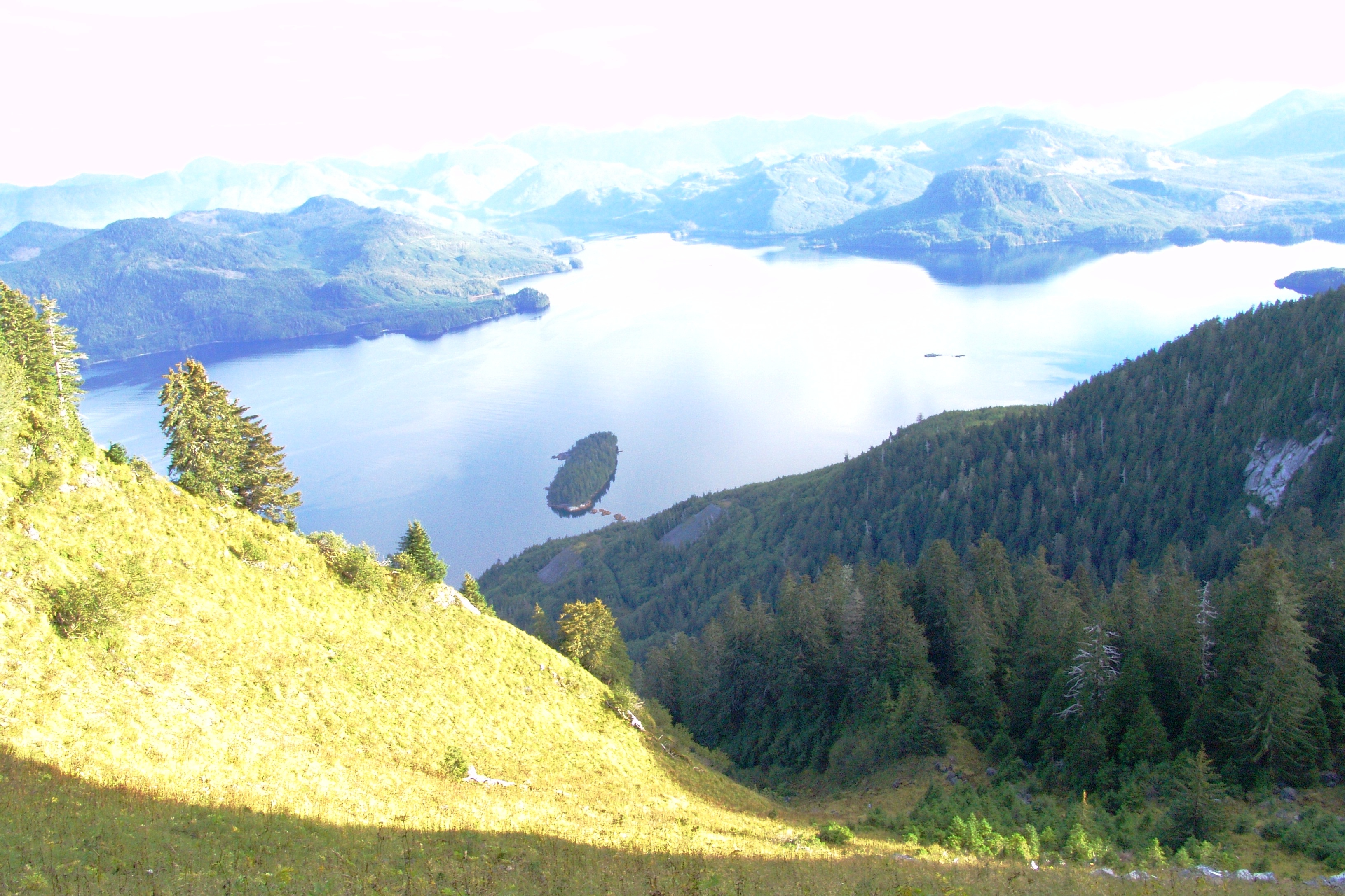 Tasu Mountain View